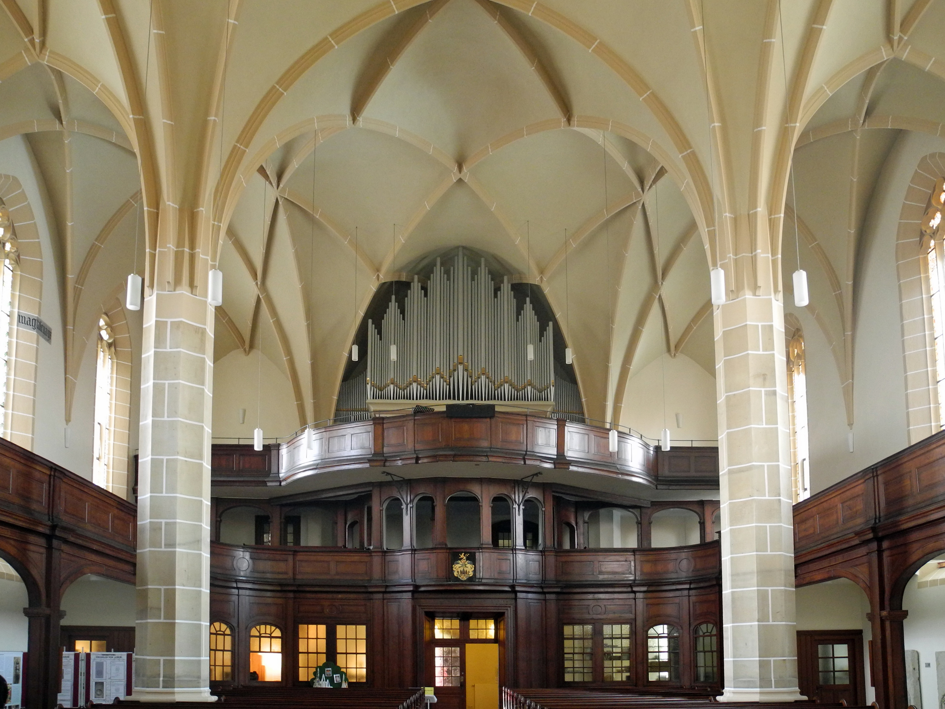 Orgelempore in der Stadtkirche St. Wenzel in Lommatzsch